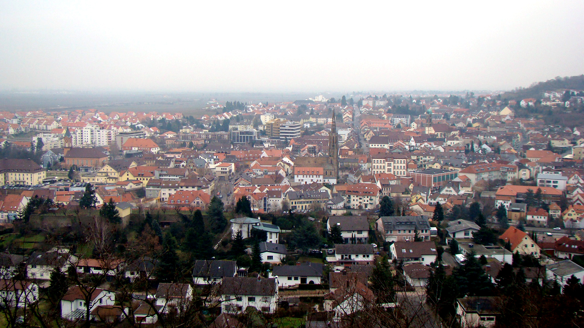 Bad Dürkheim